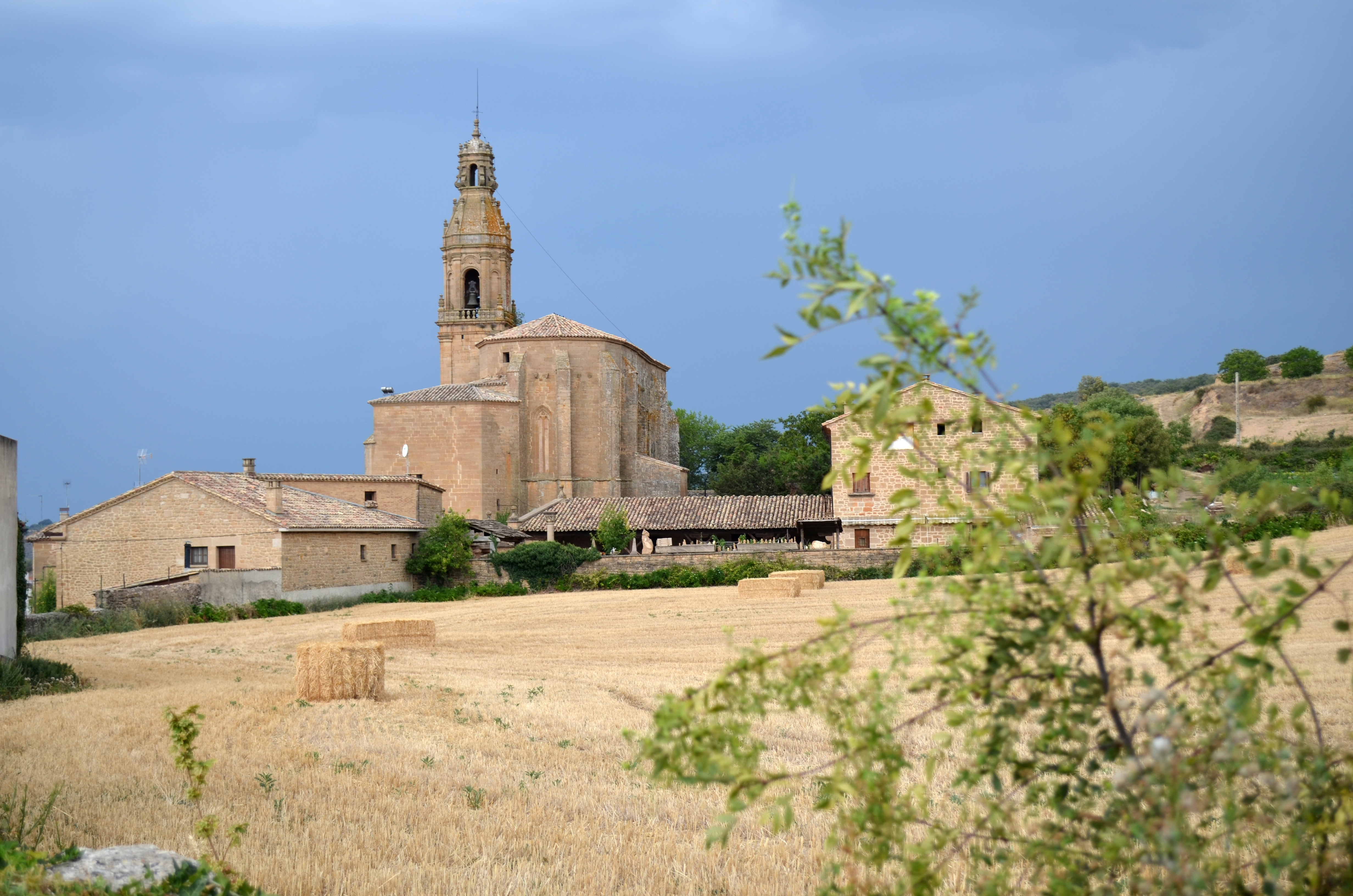 Vista del cabecero y la torre de la Iglesia de San Román, de Arellano (Navarra), desde el este; con un campo y vegetación en primer plano